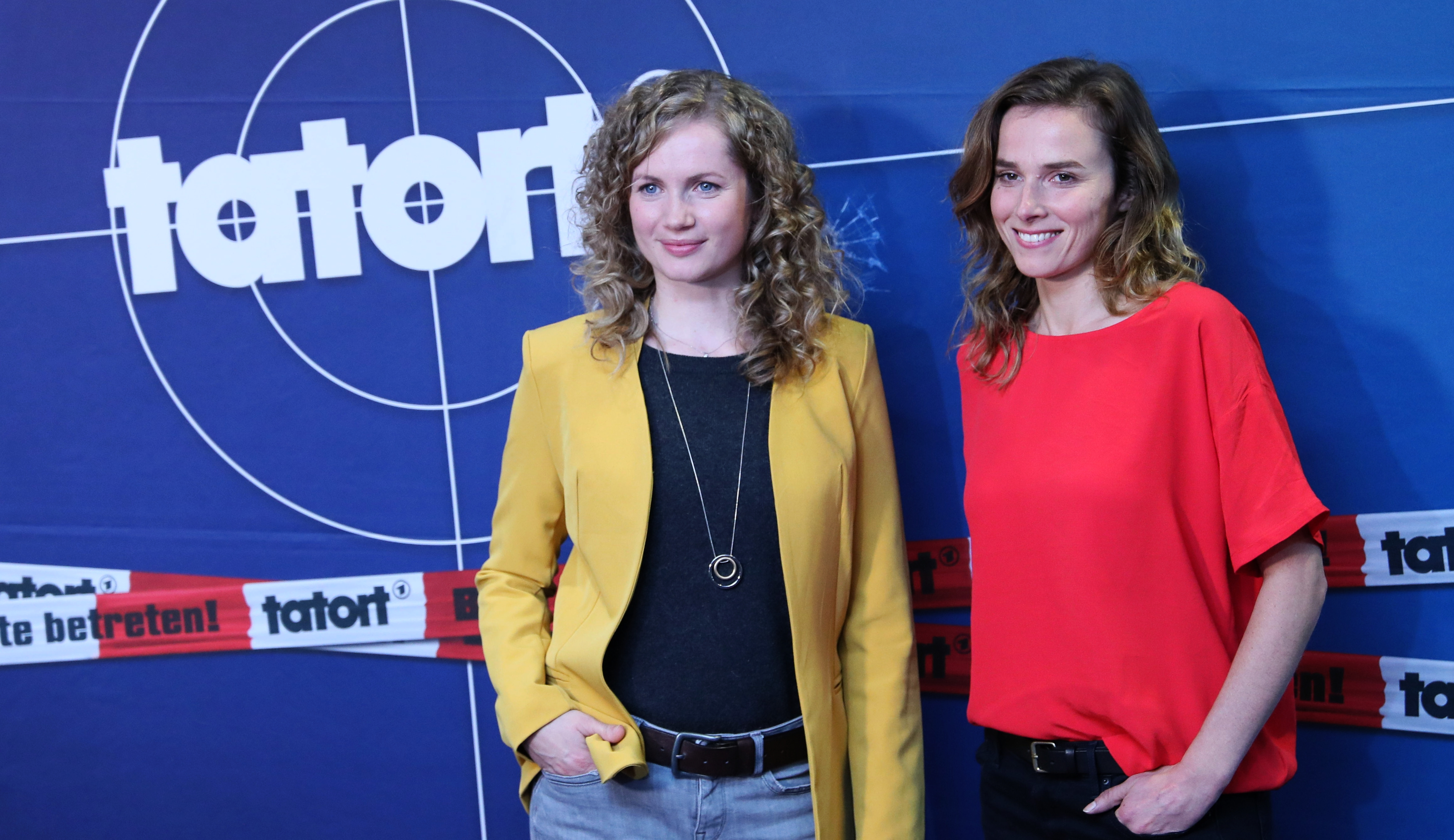 Pressetermin zum Dresdner „Tatort: Das Nest (AT)“: Cornelia Gröschel (Kriminalkommissarin Leonie Winkler), Karin Hanczewski (Kriminaloberkommissarin Karin Gorniak)